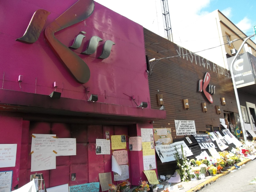 Boate que sofreu incêndio no município de Santa Maria - RS.